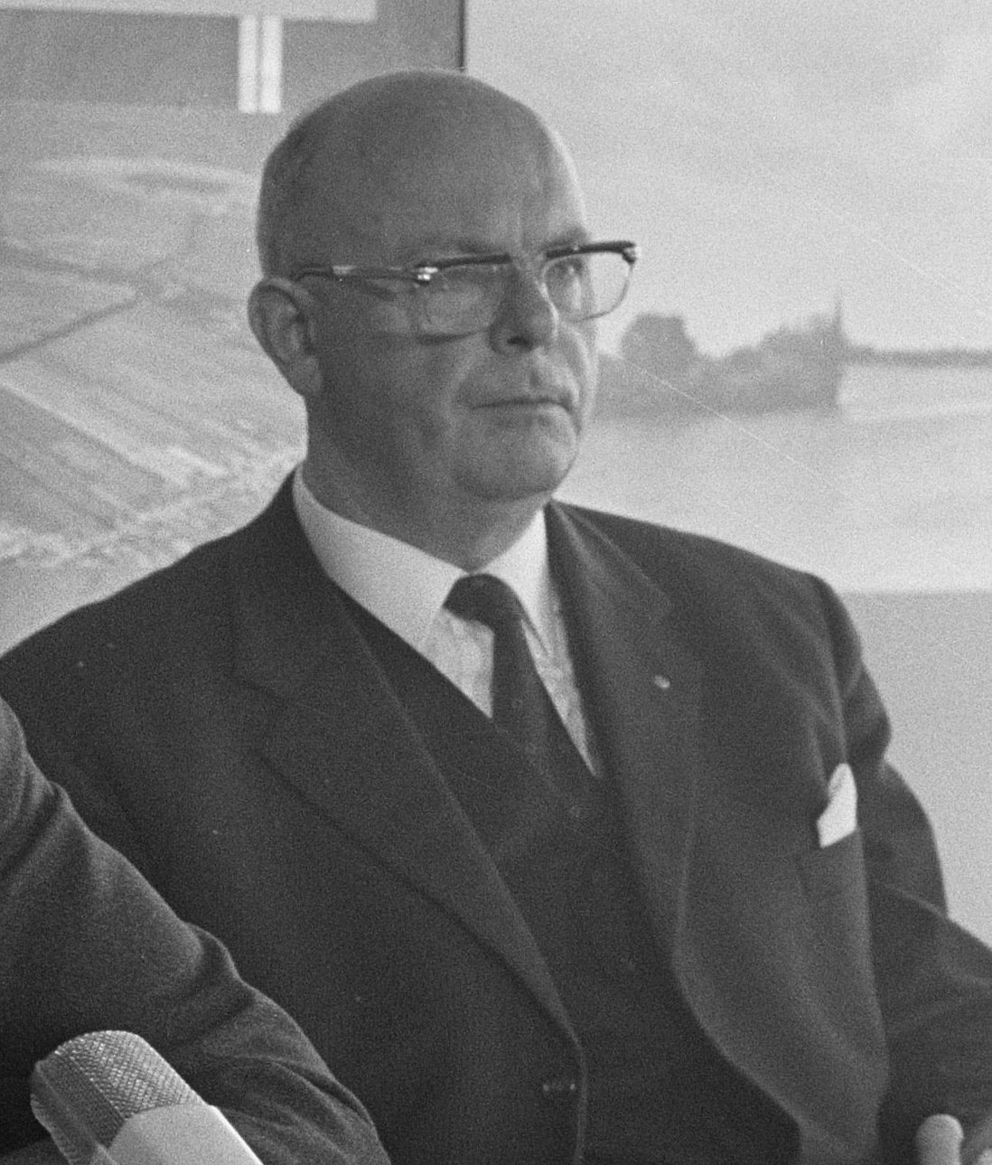 Persconferentie over recreatiegebied "Het Twiske" in Landsmeer. Links drs. R.J. de Wit (wethouder PW Adam) rechts burgemeester G.G. Post van Landsmeer